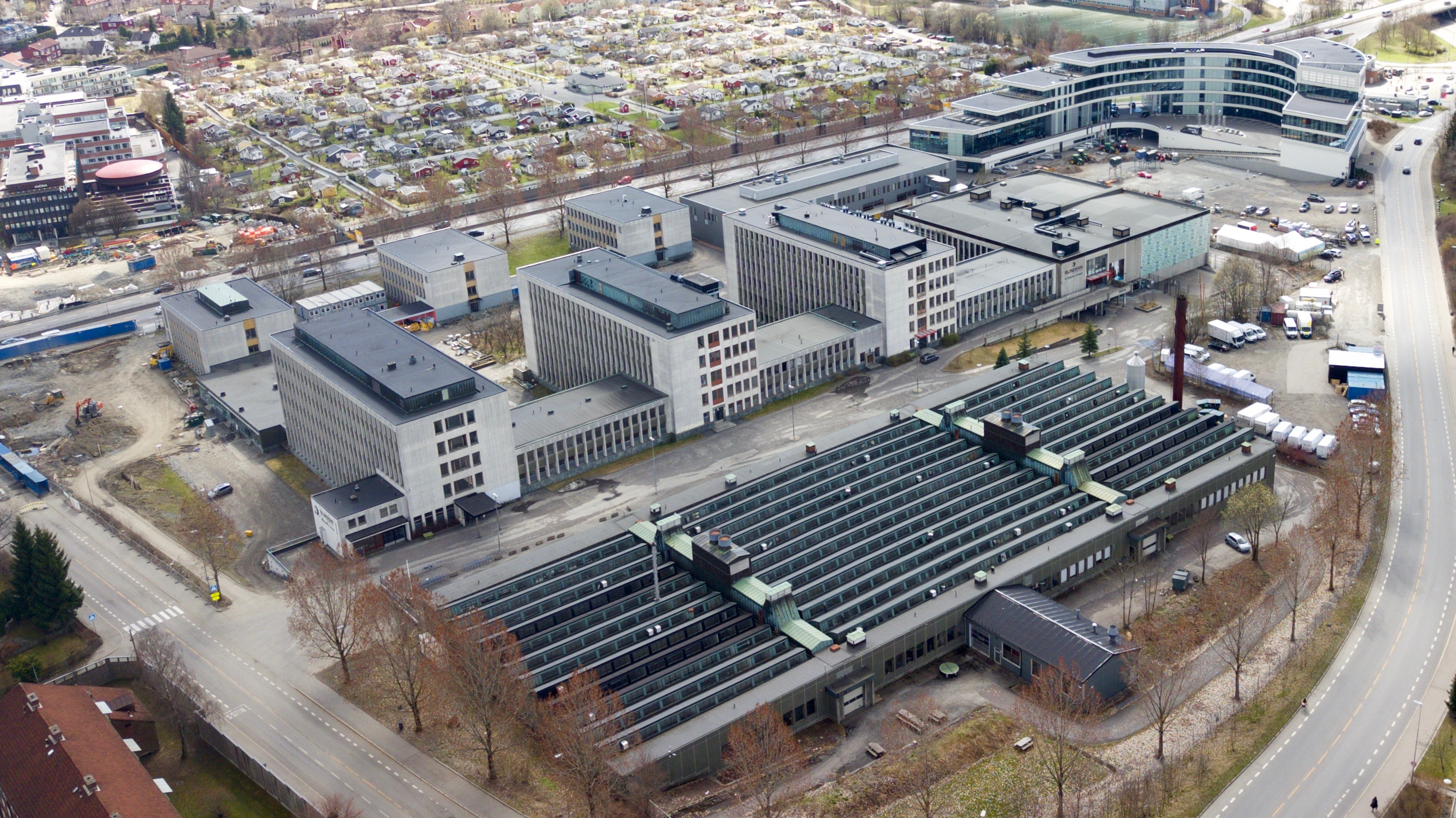 Blindern videregående skole i Oslo.